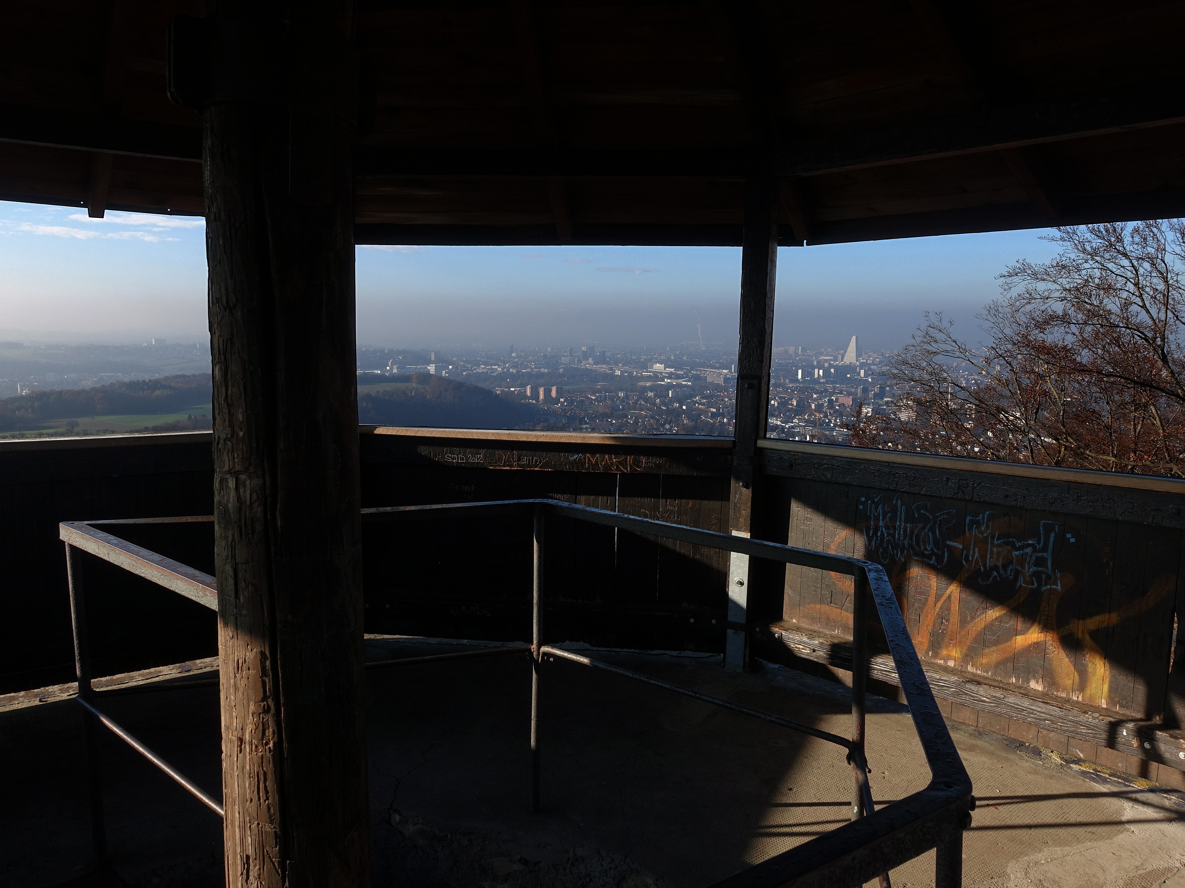 Panoramablick von der hinteren Ruine Wartenberg (aus demTurm) in Muttenz zum Bruderholz und nach Basel